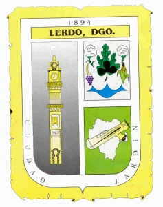 Lerdo címere